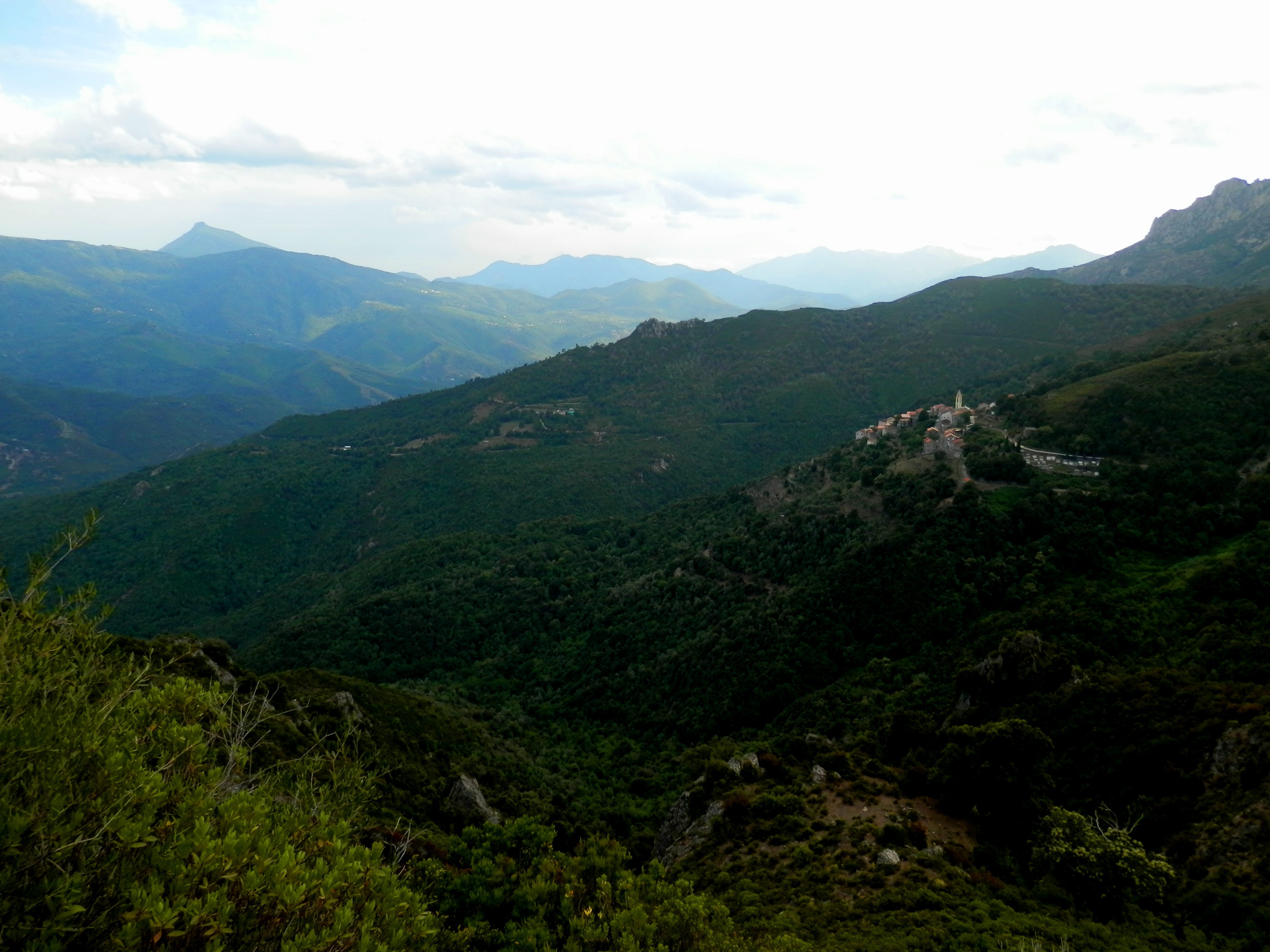 Corsu: U paese di Lentu da a strada di a Bocca di Bigornu